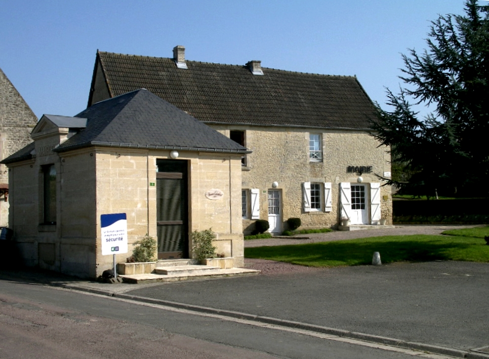 mairie de Colomby-sur-Thaon (Calvados)